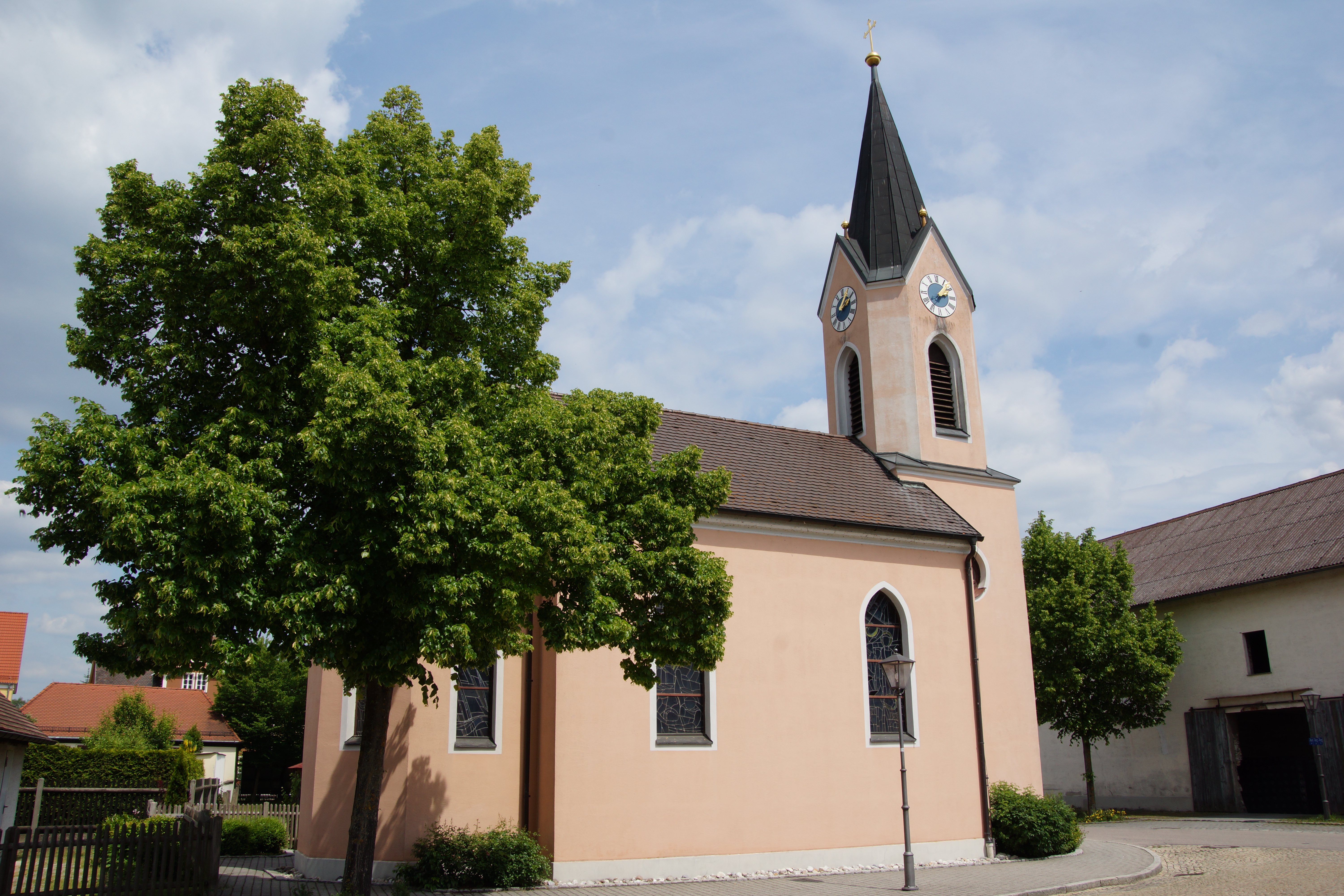 Die ehemalige Pestkirche St. Sebastian in Burglengenfeld